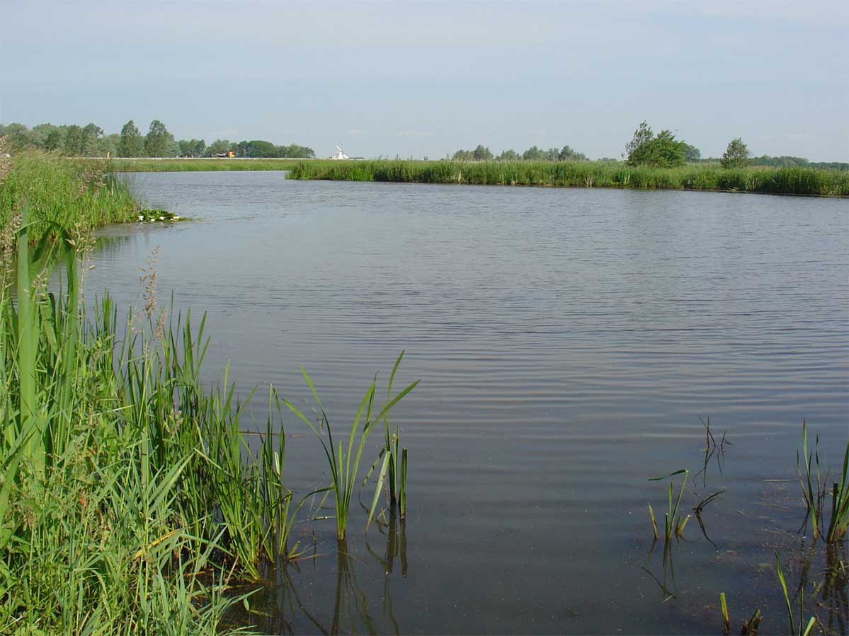 De Drentsche Aa nabij de uitmonding in het Noord-Willemskanaal bij de Witte molen